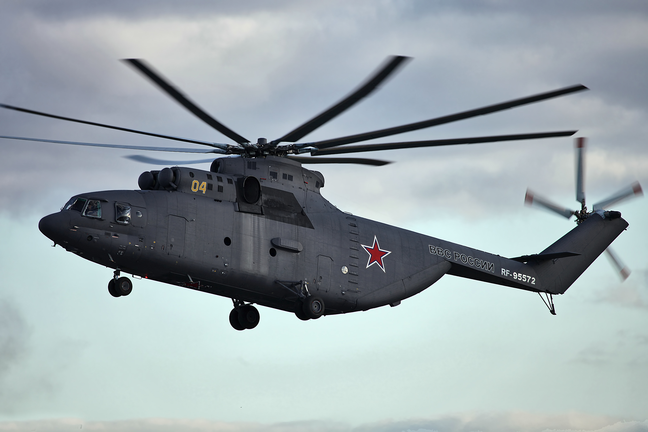 Показательное выступление Зубра началось с авиационной поддержки, два Ка-52 нанесли удар по базе террористов. Затем пошла высадка штурмовой группы на Тиграх. (Demonstration started with air strike by two Ka-52, after that Mi-26 airlanded assault group with GAZ-233036 SPM-2